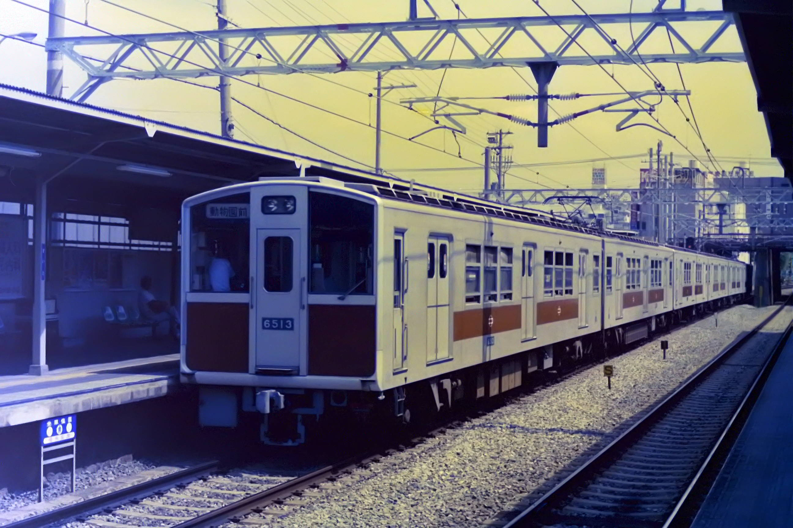 大阪市交通局 6513 阪急・吹田駅